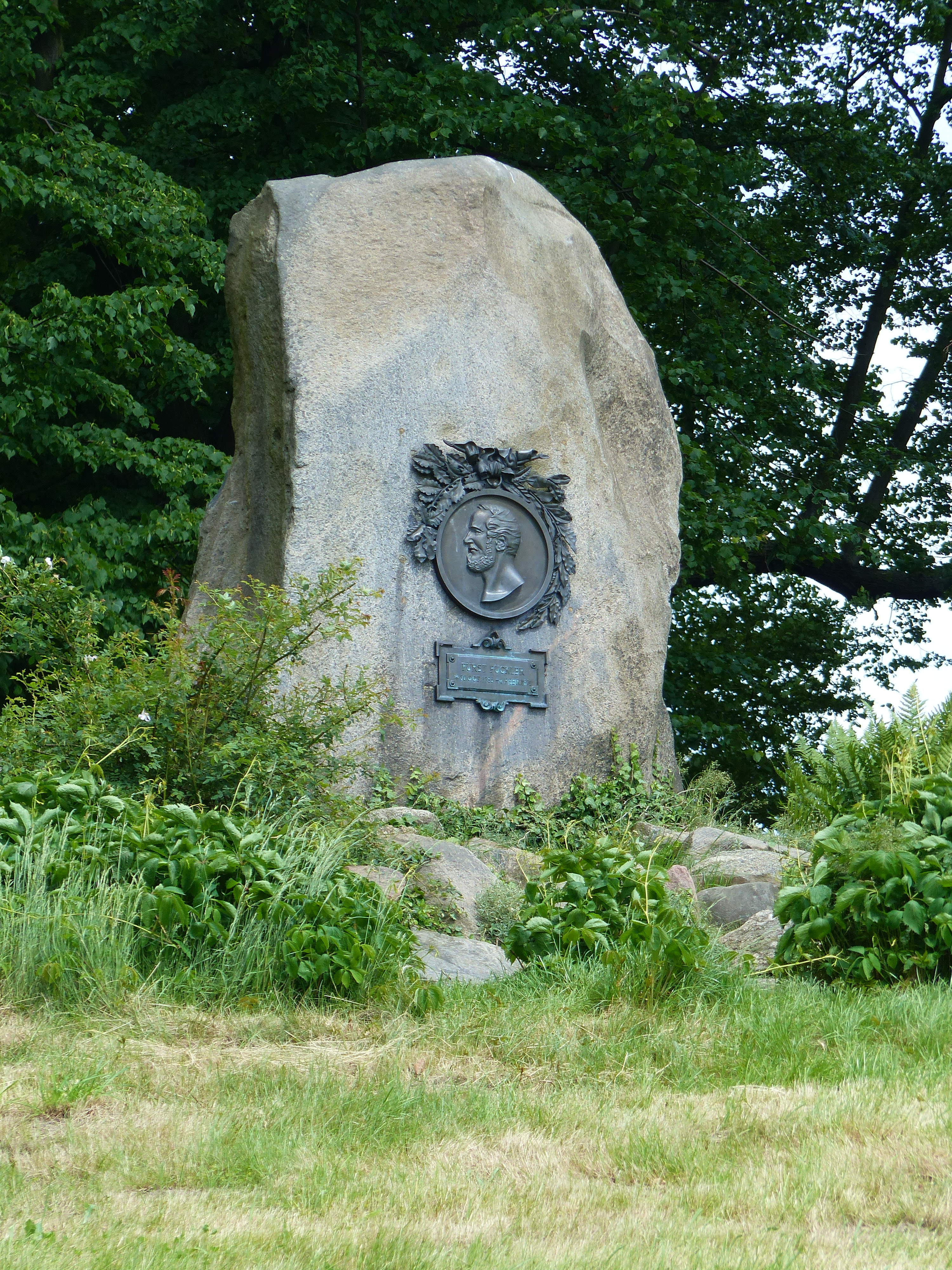 Fürst-Pückler-Park Bad Muskau, Muskauer Parklandschaft (LSG d 48), UNESCO-Welterbe